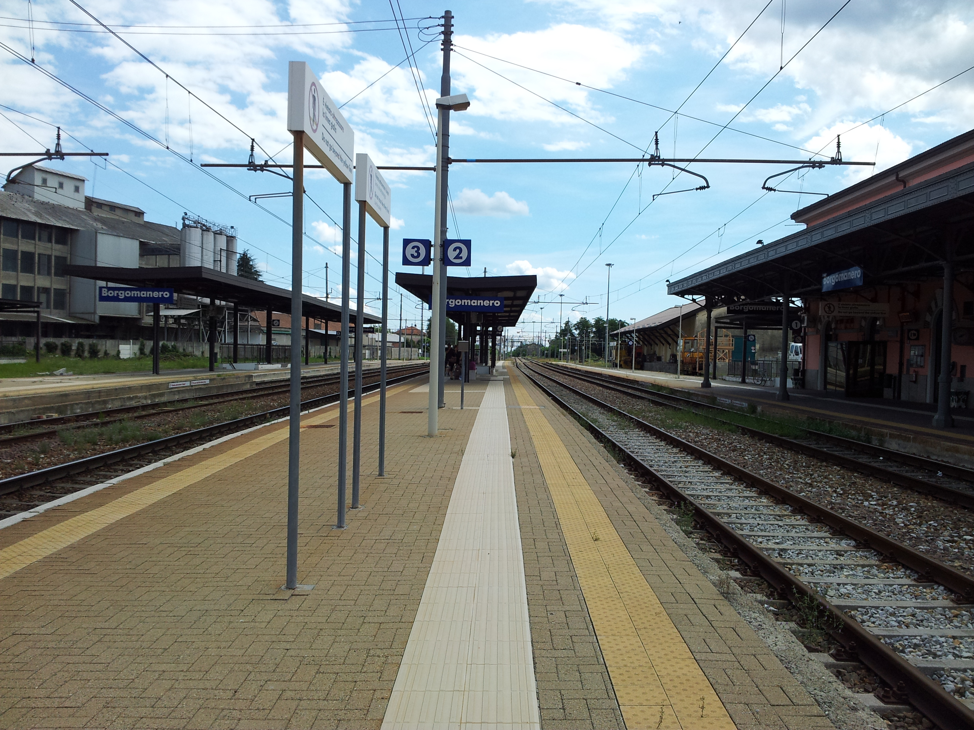 Stazione lato binari, in direzione Novara e Santhià.